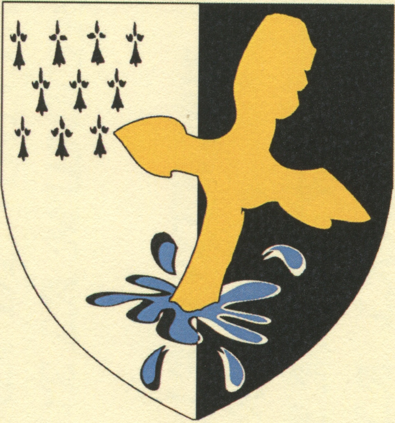 Blason de la commune de la Landec (22)